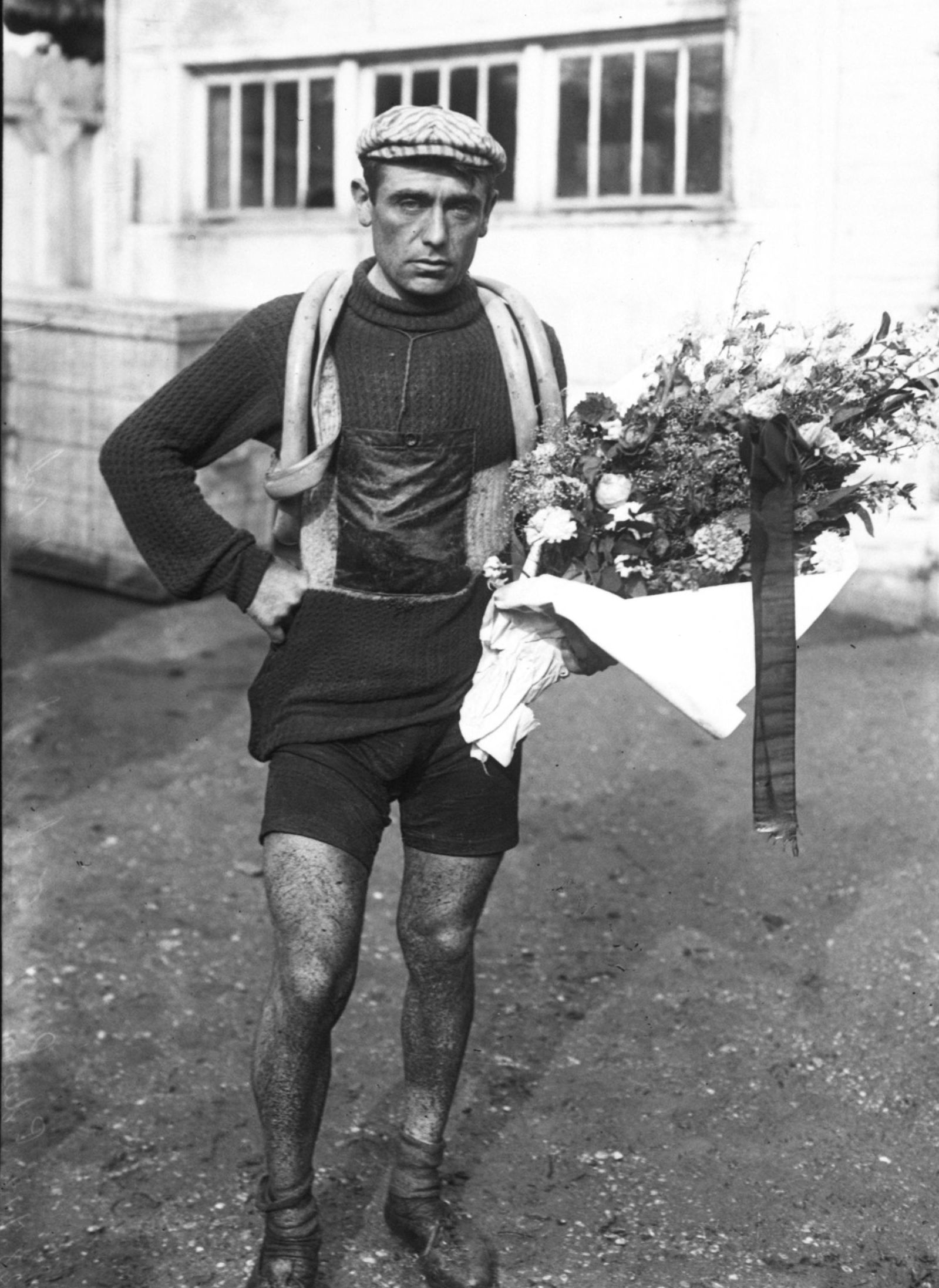 Eugène Christophe à l'arrivée du Tour de France 1912